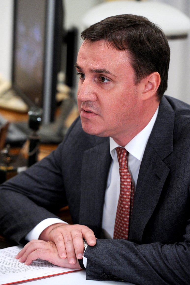 Председатель правления «Россельхозбанка» Дмитрий Патруше